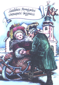 Hochzeit in der Kirche zu Pernigele (Liepupe)